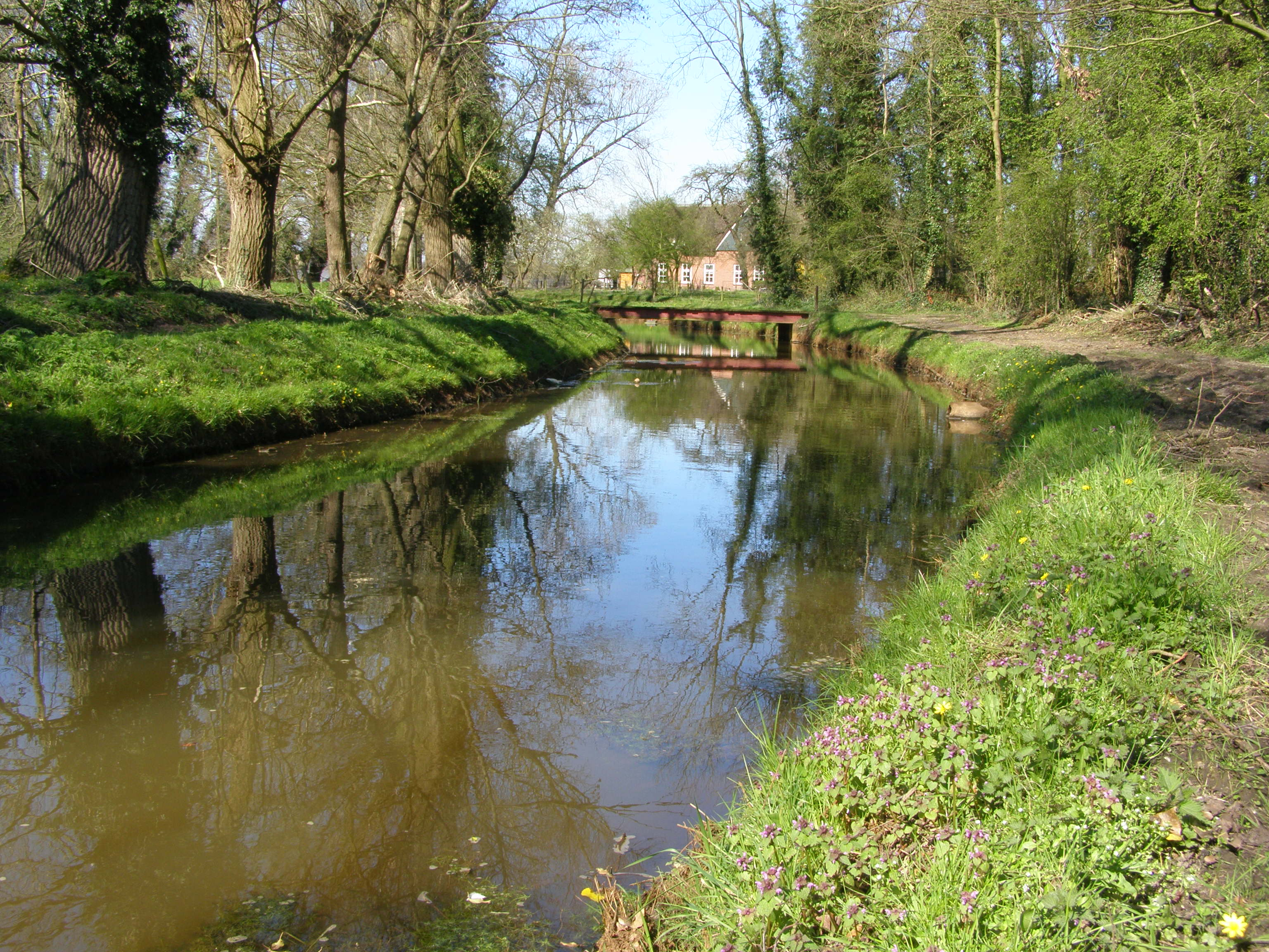 eigen werk